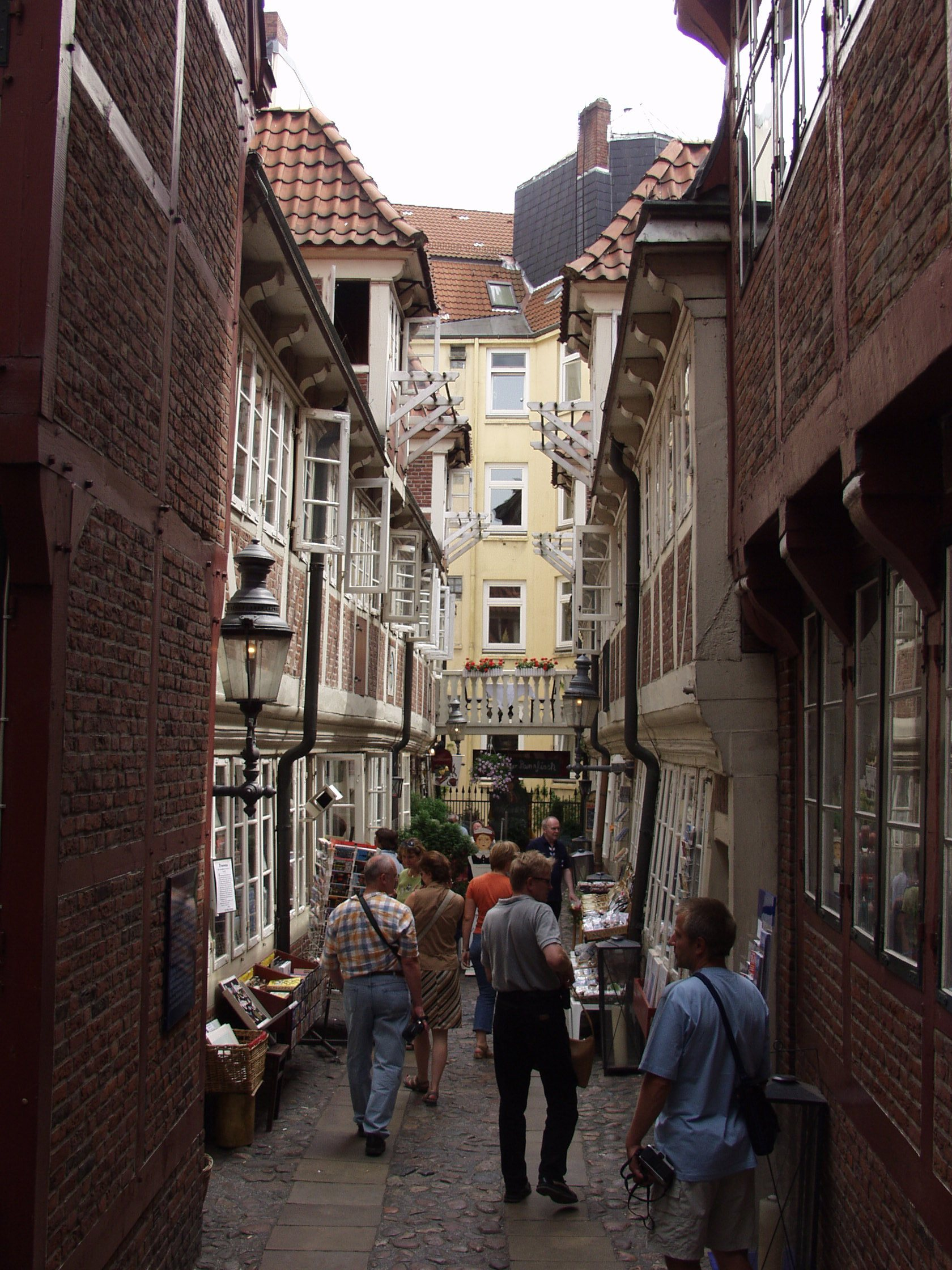 Krameramtsstuben in Hamburg This is a photograph of an architectural monument.